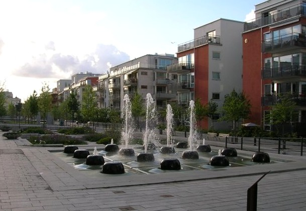 Sjöstadsparterren, fontän "Fält" av Thomas Nordström, Södra Hammarbyhamnen, Stockholm, Sweden